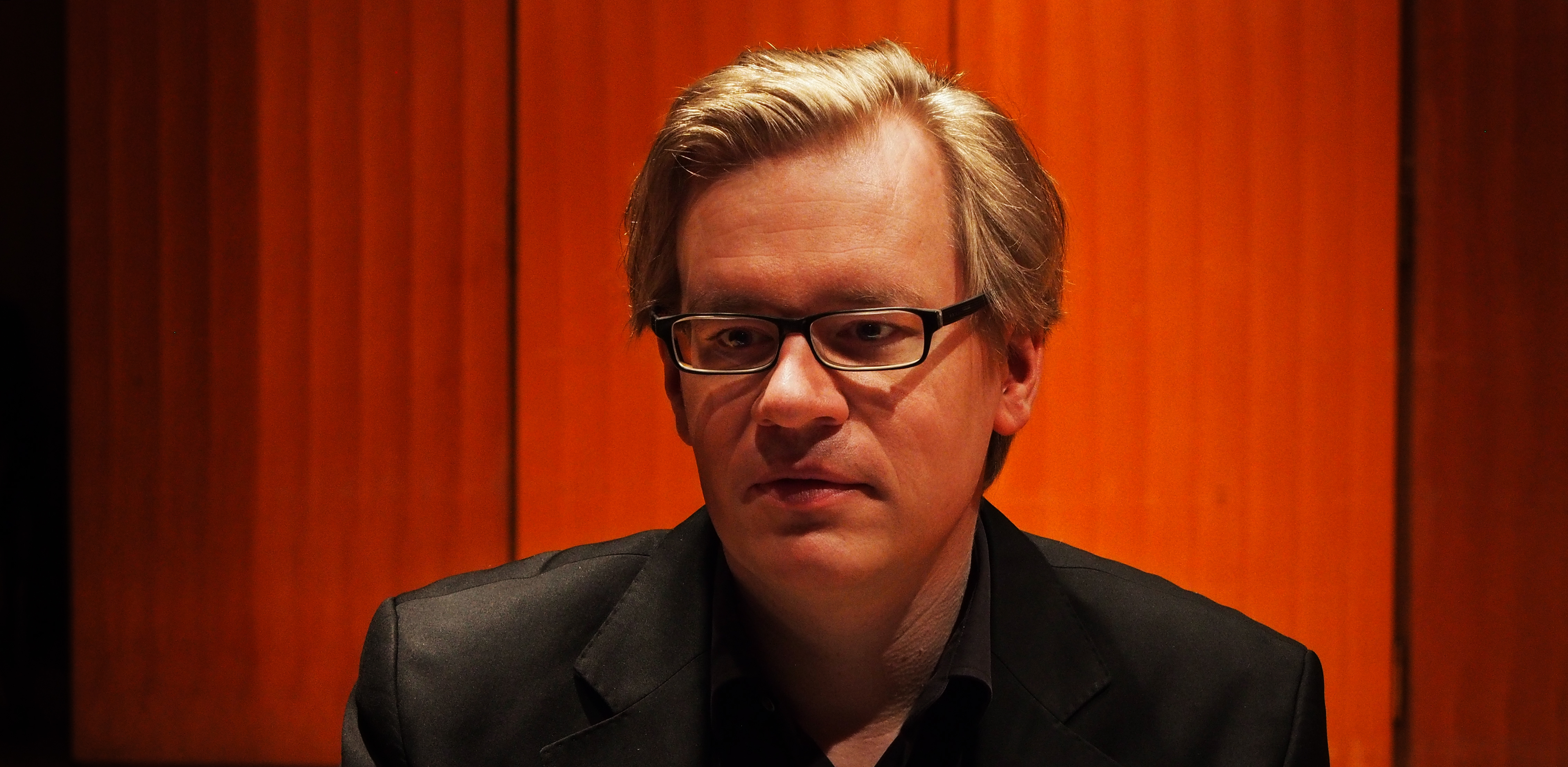 Markus Bellheim